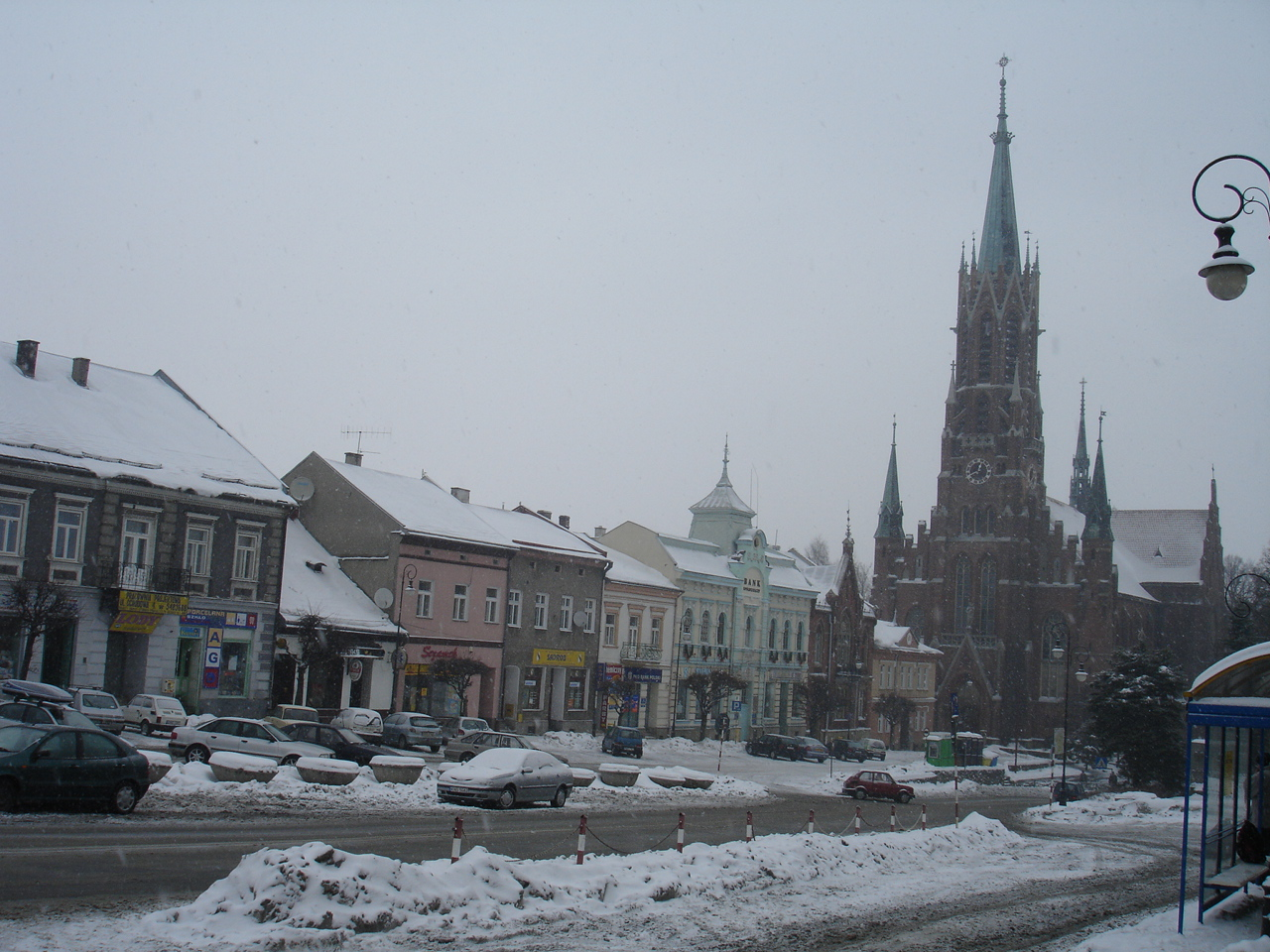 Grybów, neogotycki kościół i rynek przy drodze DK28, styczeń 2006